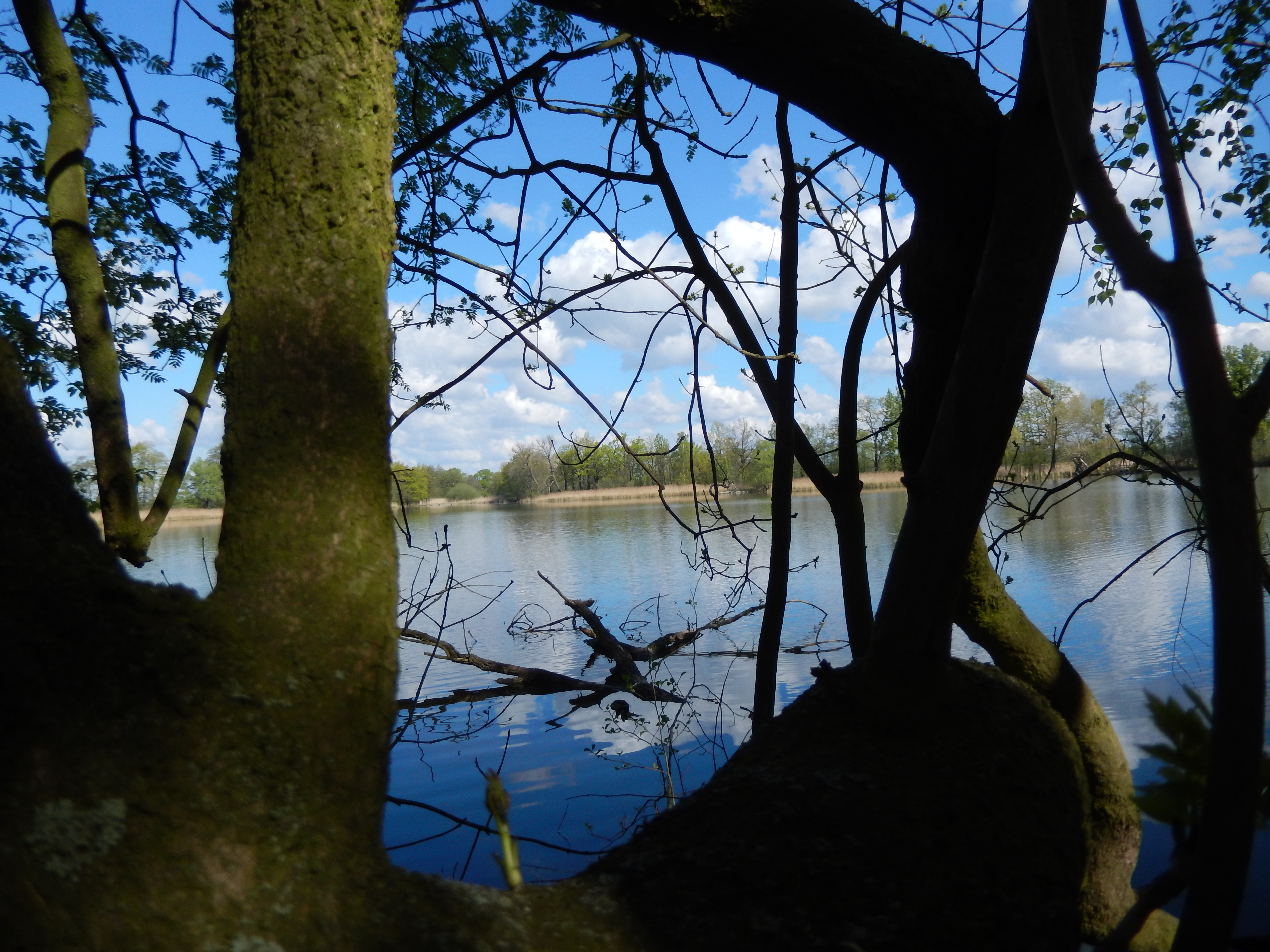 Lake in the Reservat Oberlausitzer Heide- und Teichlandschaft